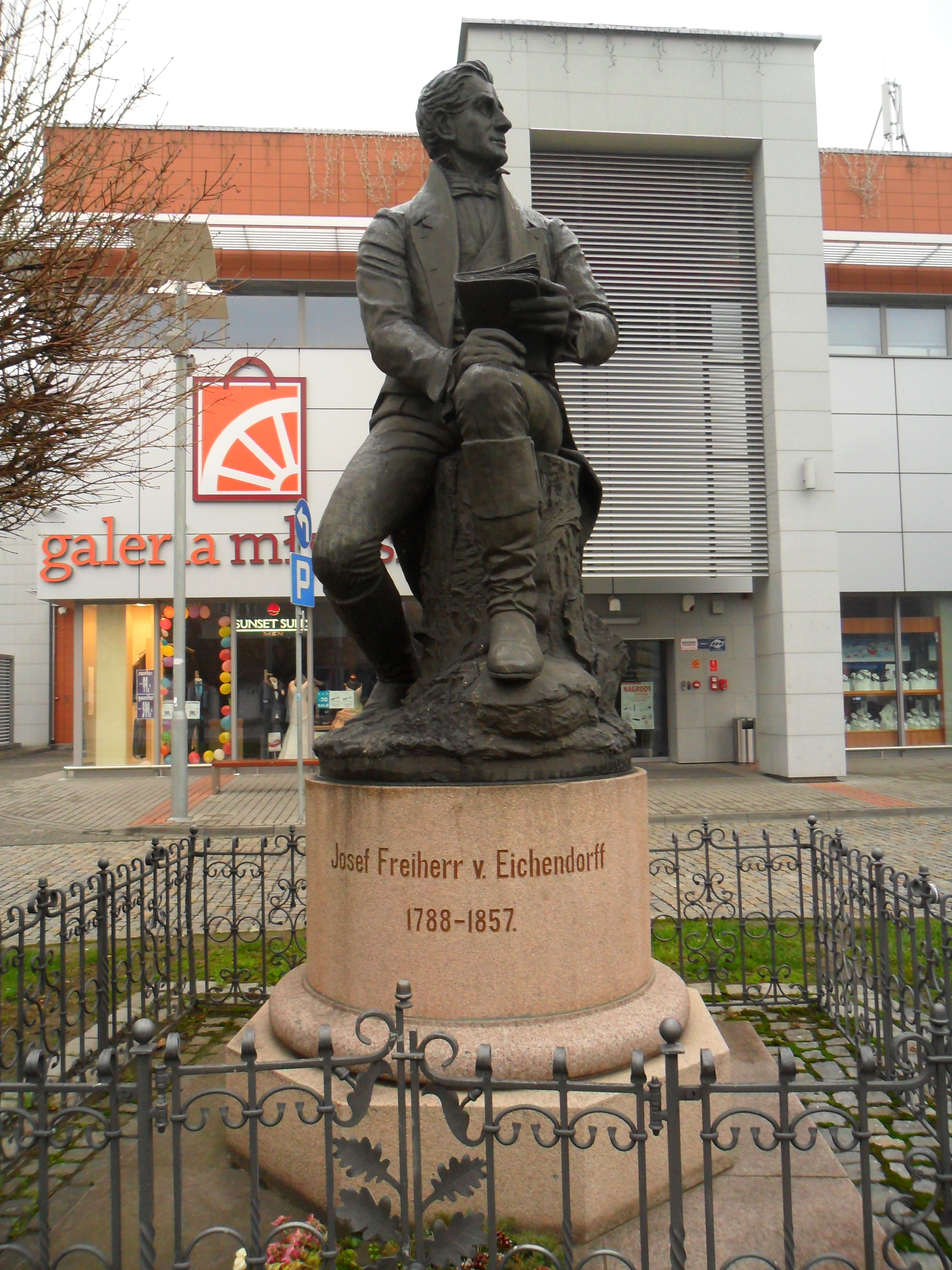 Pomnik Josepha von Eichendorffa w Raciborzu.